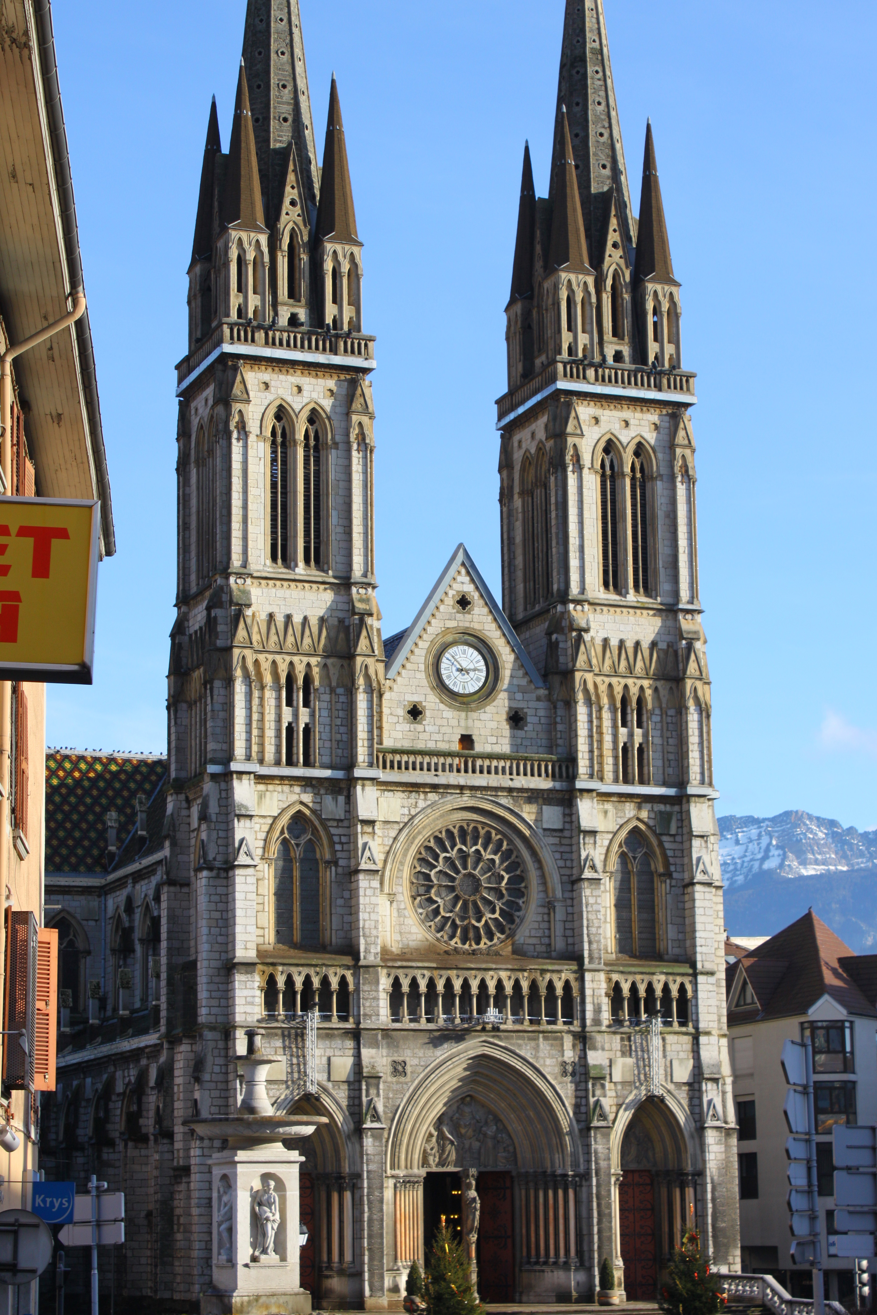 L'Église Saint-Bruno de Voiron.